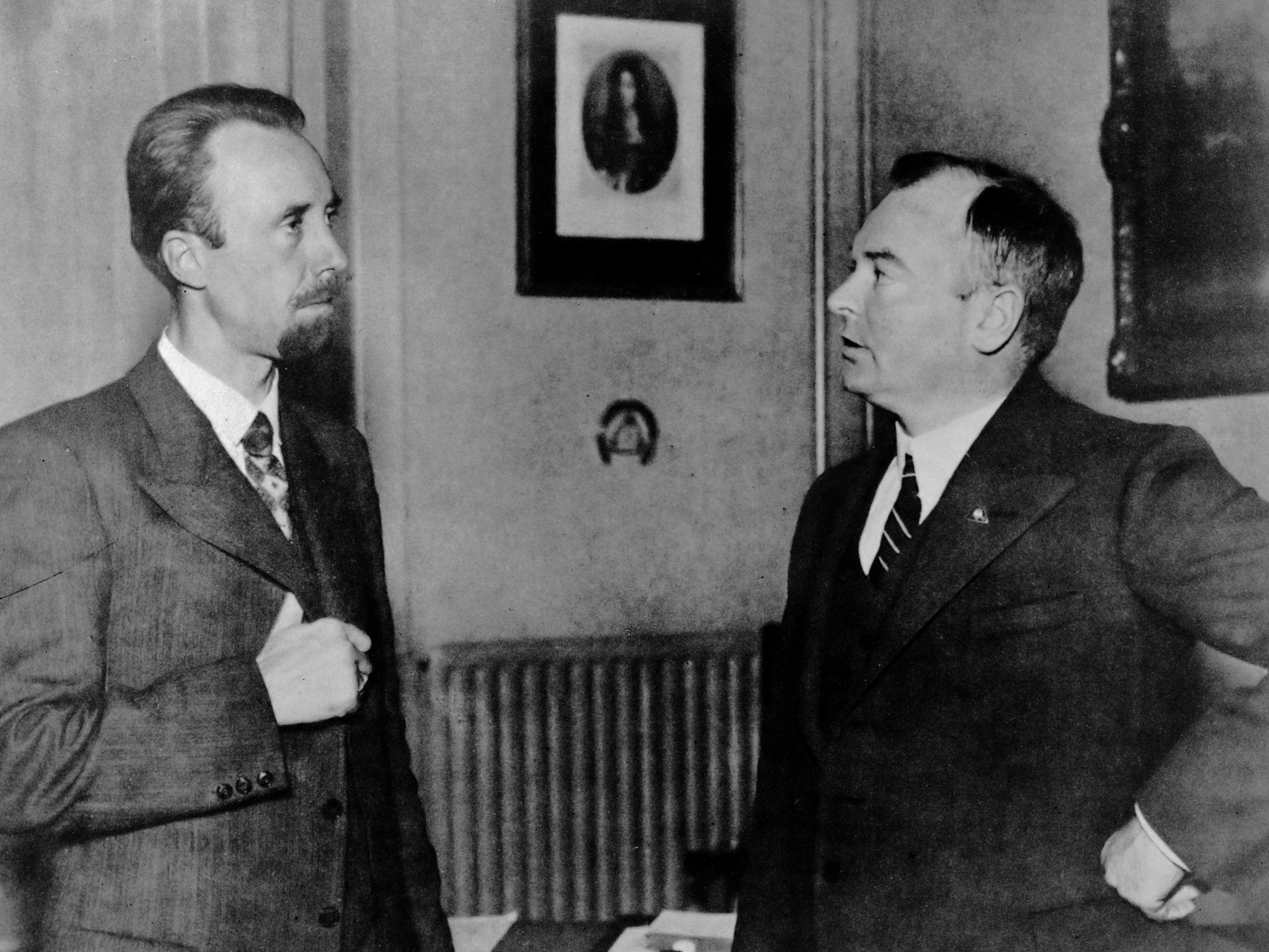 Nationaal-Socialistische Beweging. A.A. Mussert (links) in gesprek met Flor Grammens van het Vlaams Nationaal Verbond